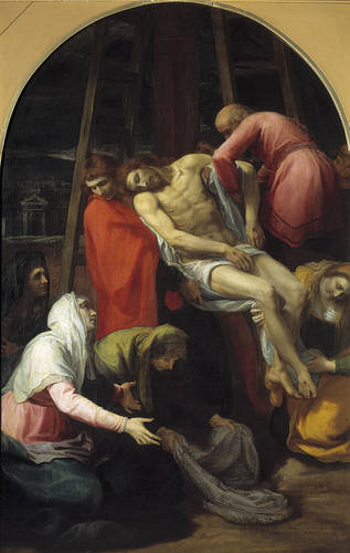 La obra representa el momento en que Jesucristo fue descoolgado de la cruz, y es una de las obras de Bartolomé Carducho que se conservan en el Museo del Prado.